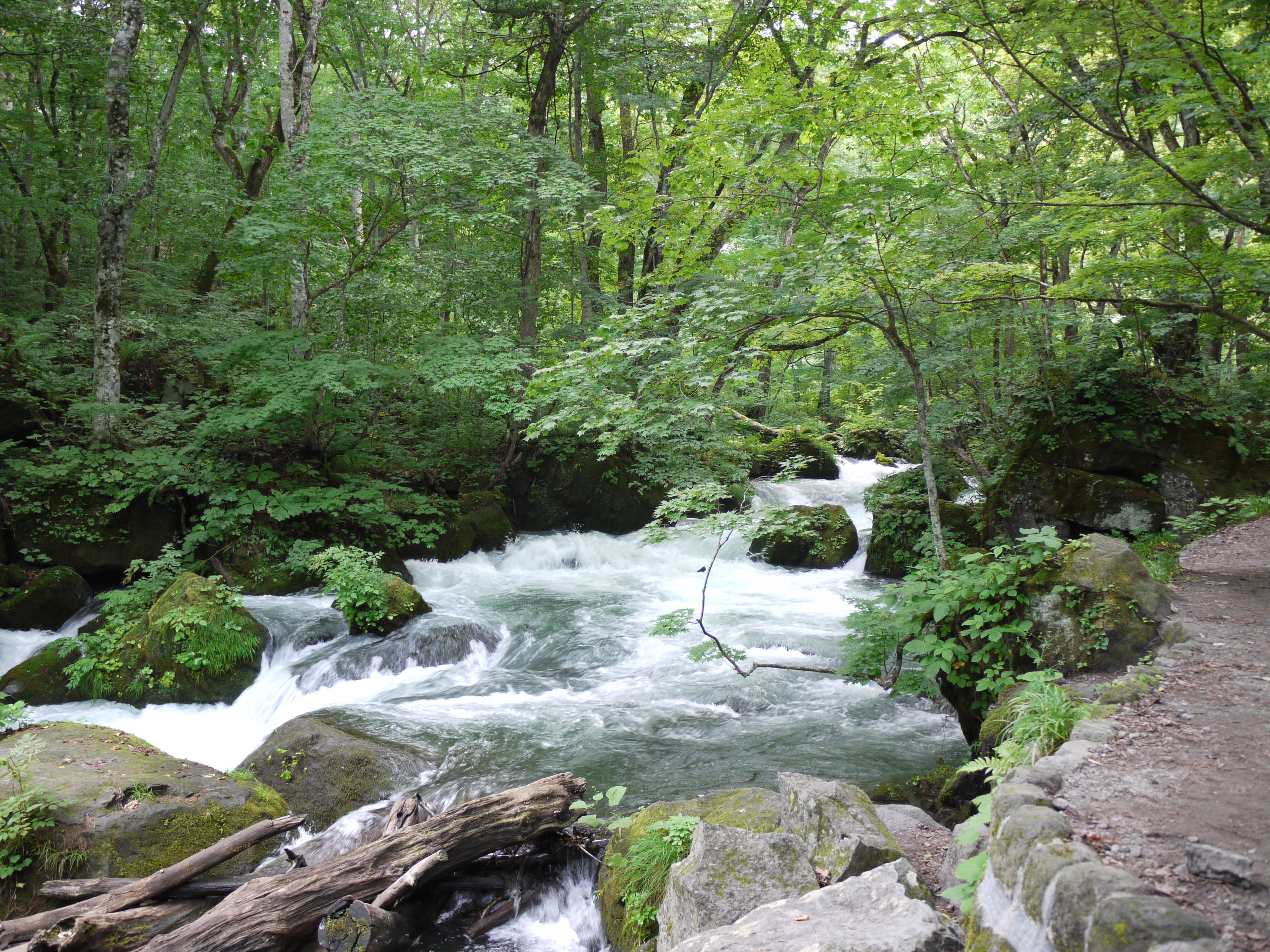 奥入瀬渓谷 阿修羅の流れ付近